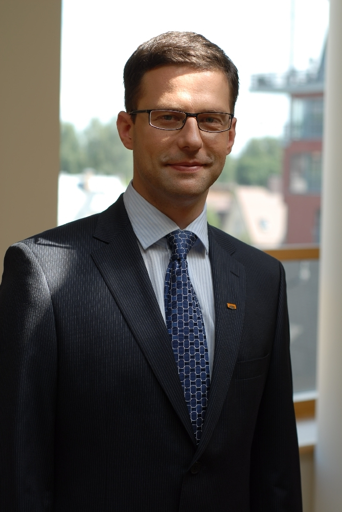 Sarunas Gustainis